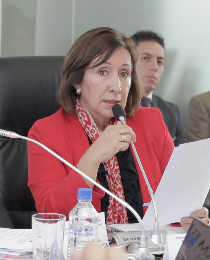 14 de junio de 2017 - Comisión de Relaciones Internacionales recibe a: - María Fernanda Espinosa, ministra de Relaciones Exteriores - Igar Paluyán, embajador Extraordinario y Plenipotenciario de Belarús en el Ecuador - Pablo Campana, ministro de Comercio Exterior TEMA: Estado de las relaciones entre Ecuador y Belarús - Pablo Campana, ministro de Comercio Exterior - Walter Eduardo Durán, embajador de El Salvador en el Ecuador, TEMA: Presentación de resultados de la negociación entre los Gobiernos de El Salvador y del Ecuador - Pablo Campana, ministro de Comercio Exterior, - Aída Leticia Talavaera Araúz, embajador de Nicaragua, TEMA: Resultados de la negociación entre los Gobiernos de Nicaragua y Ecuador Fotografía: José Luis Maldonado/ Asamblea Nacional